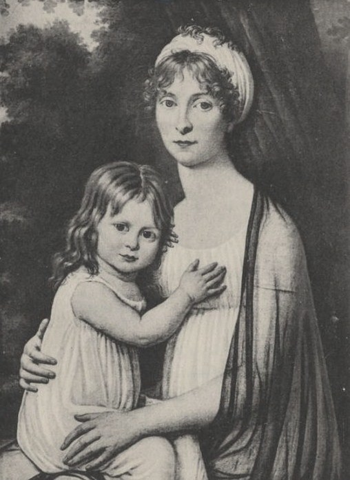 Anne Adélaïde Dechaux et sa fille Jenny Hoche